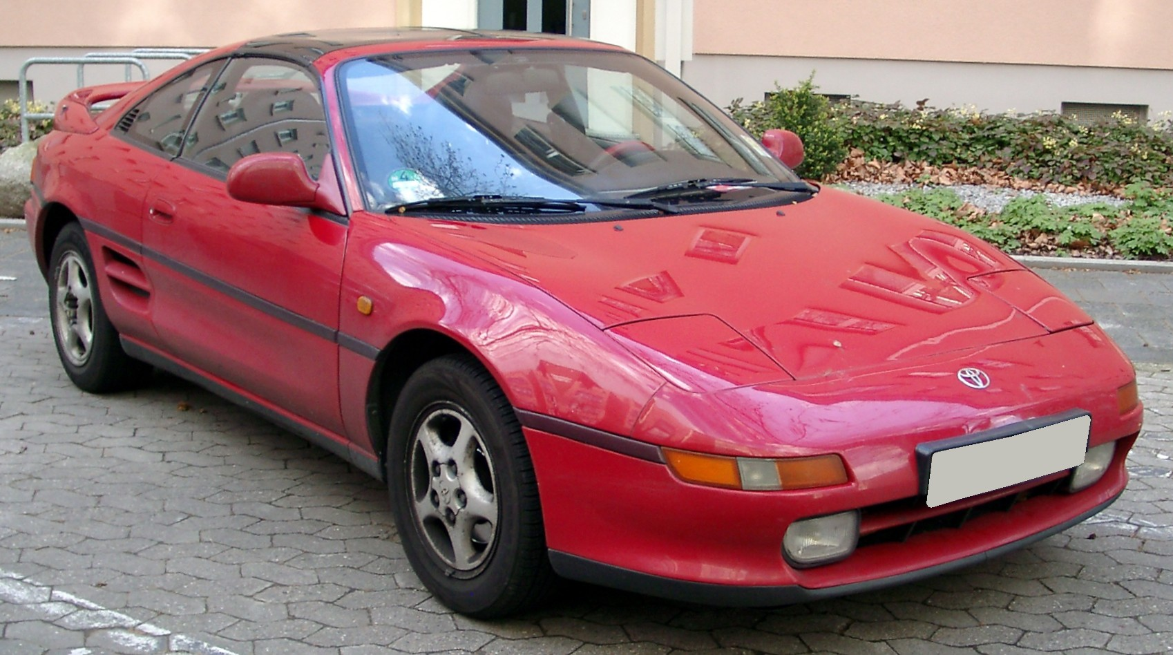 Toyota MR2 W2